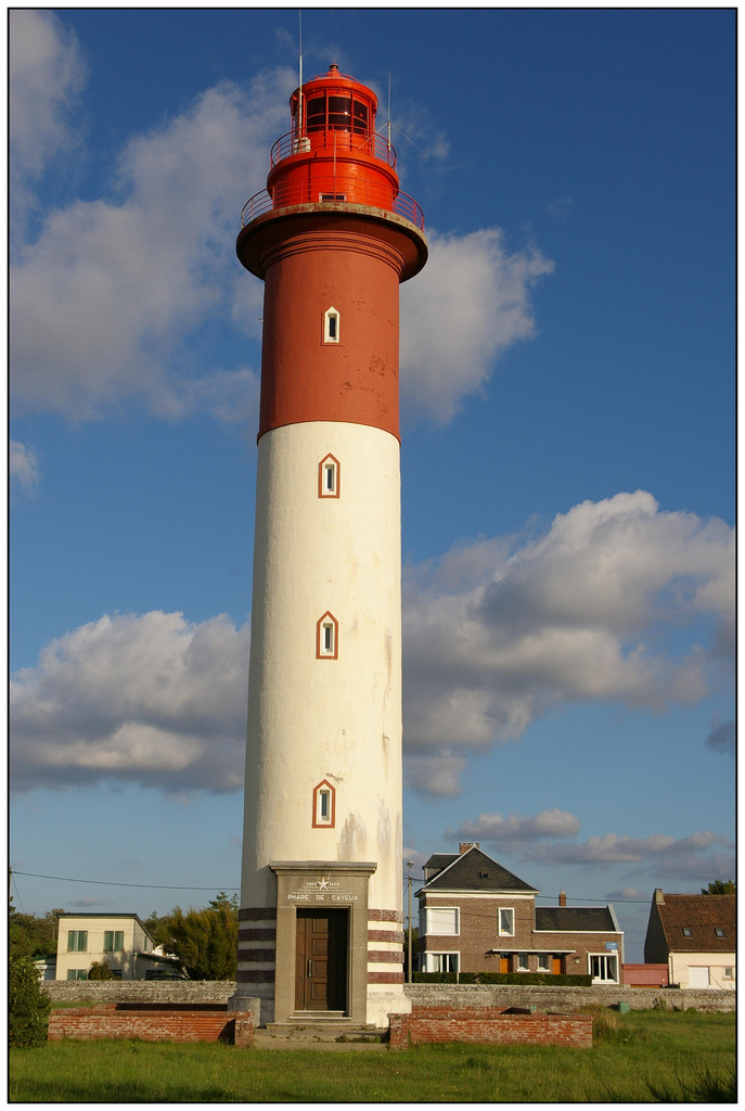 Faro de Cayeux-sur Mer. Deartamento de Somme. Francia